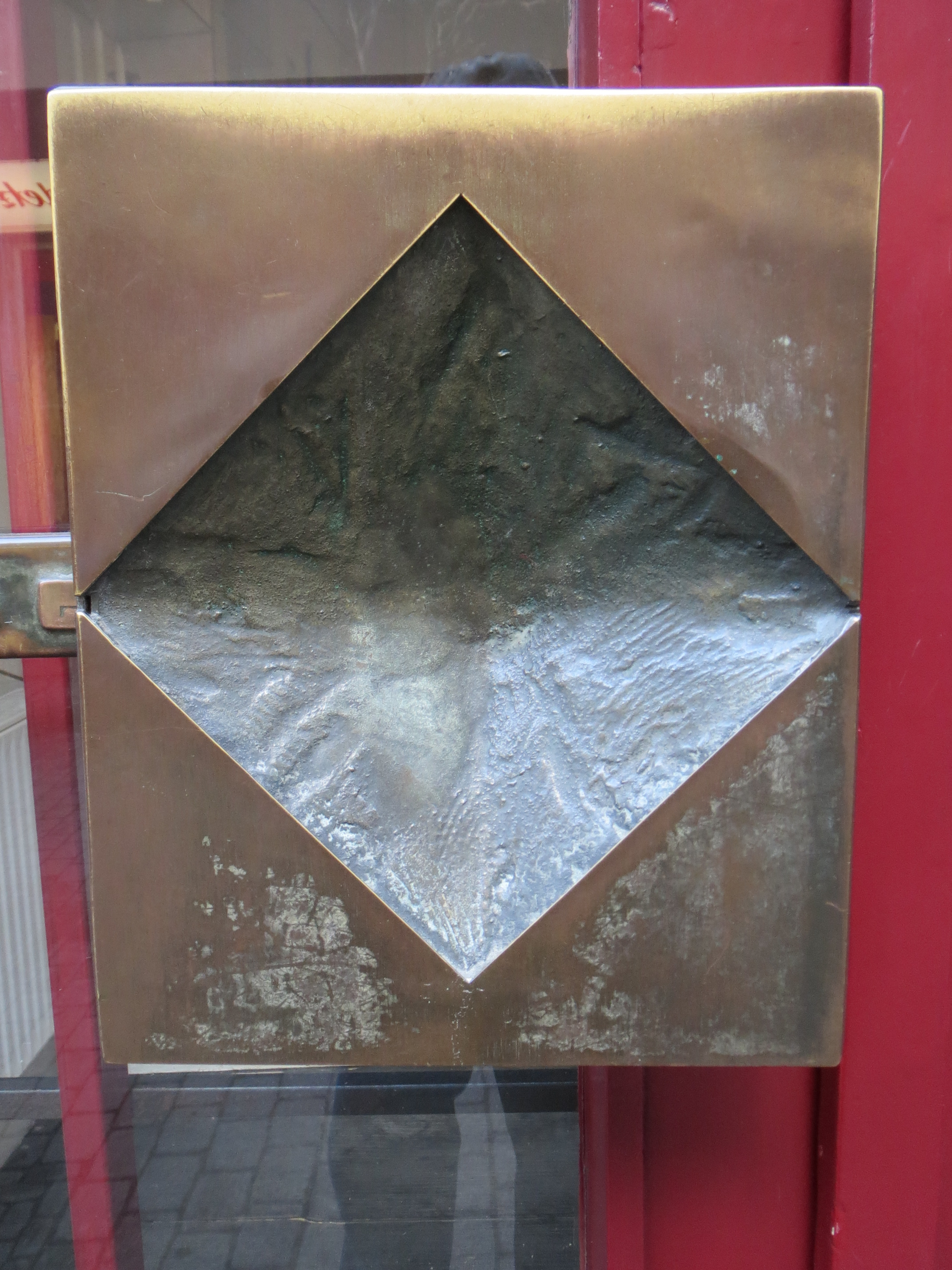 Pfaffenstraße 17: Silberschmiede Oehlschlaeger